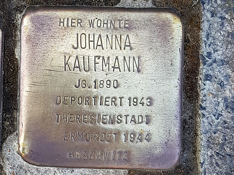 Stolperstein für Johanna Kaufmann, Prinz-Albrecht-Str. 17, Duisburg-Duissern, Jg. 1890, deportiert 1943 ins KZ Theresienstadt, ermordet 1944 im Vernichtungslager Auschwitz